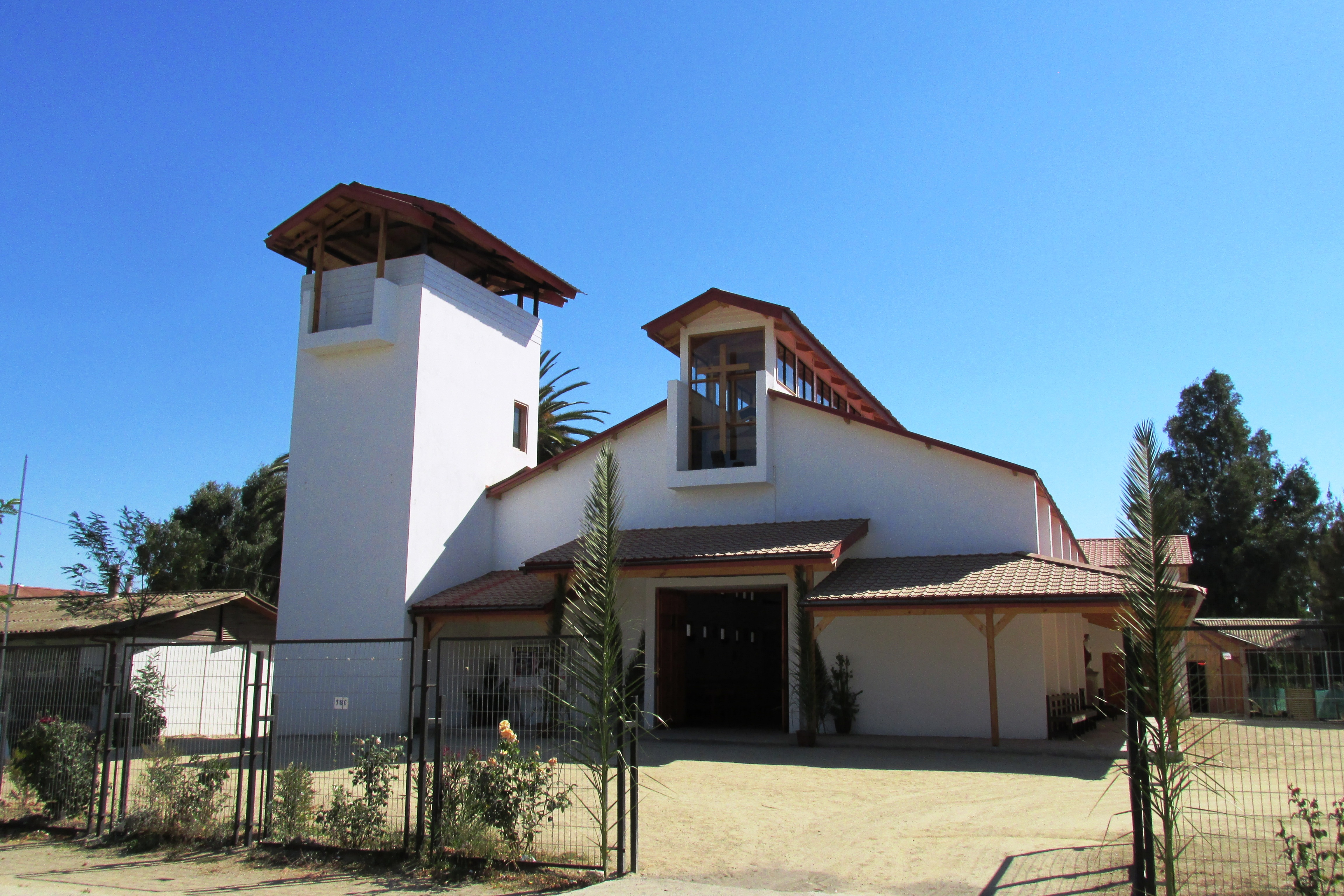 Vista frontal Iglesia San Pedro en comuna San Pedro de Melipilla región Metropolitana Chile